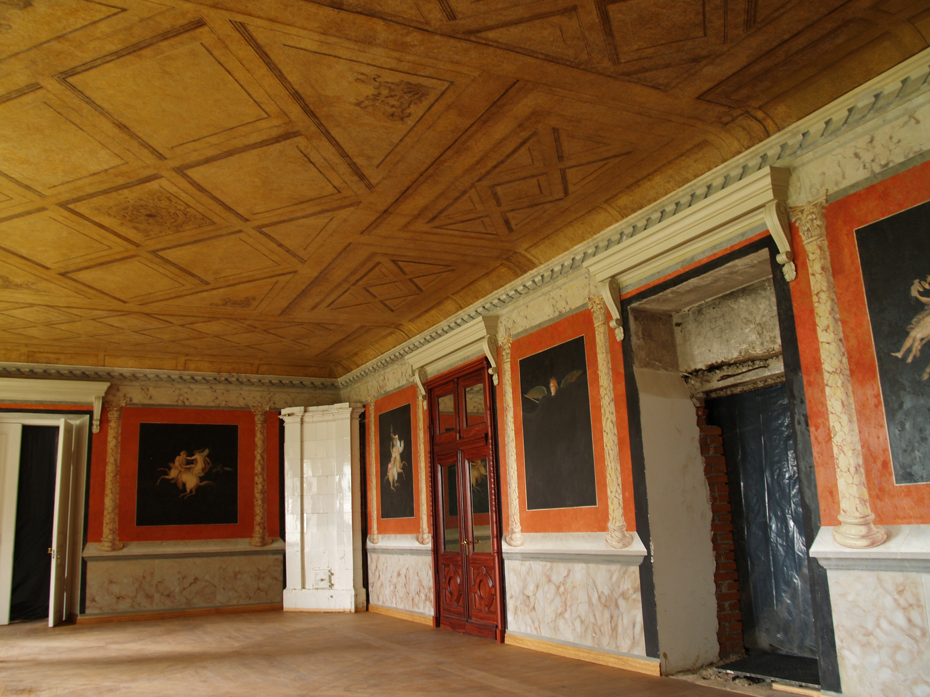 Suure-Kõpu mõisa peahoone.